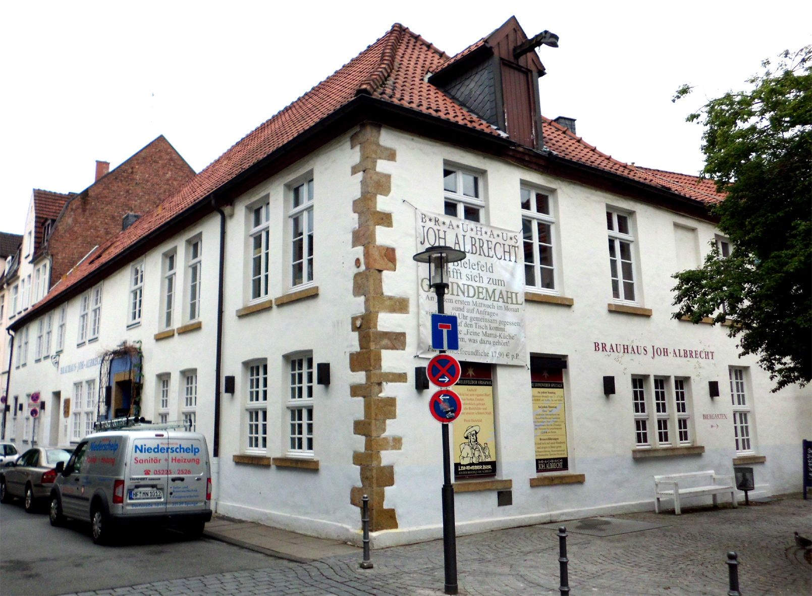 Bielefeld, Denkmalnummer 108, ehemaliger Wendt'scher Hof in der Hagenbruchstraße